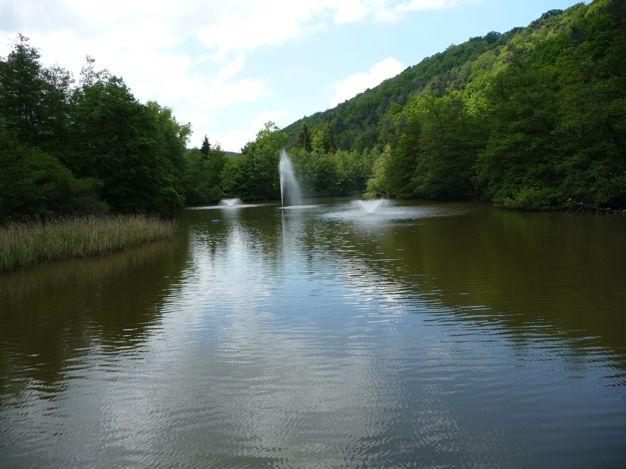 Der Weiler Maihof-Drahtzug ist ein Ortsteil der Ortsgemeinde Altleiningen im rheinland-pfälzischen Landkreis Bad Dürkheim.